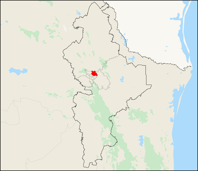 Mapa del distrito electoral federal 2 ubicado en Nuevo León